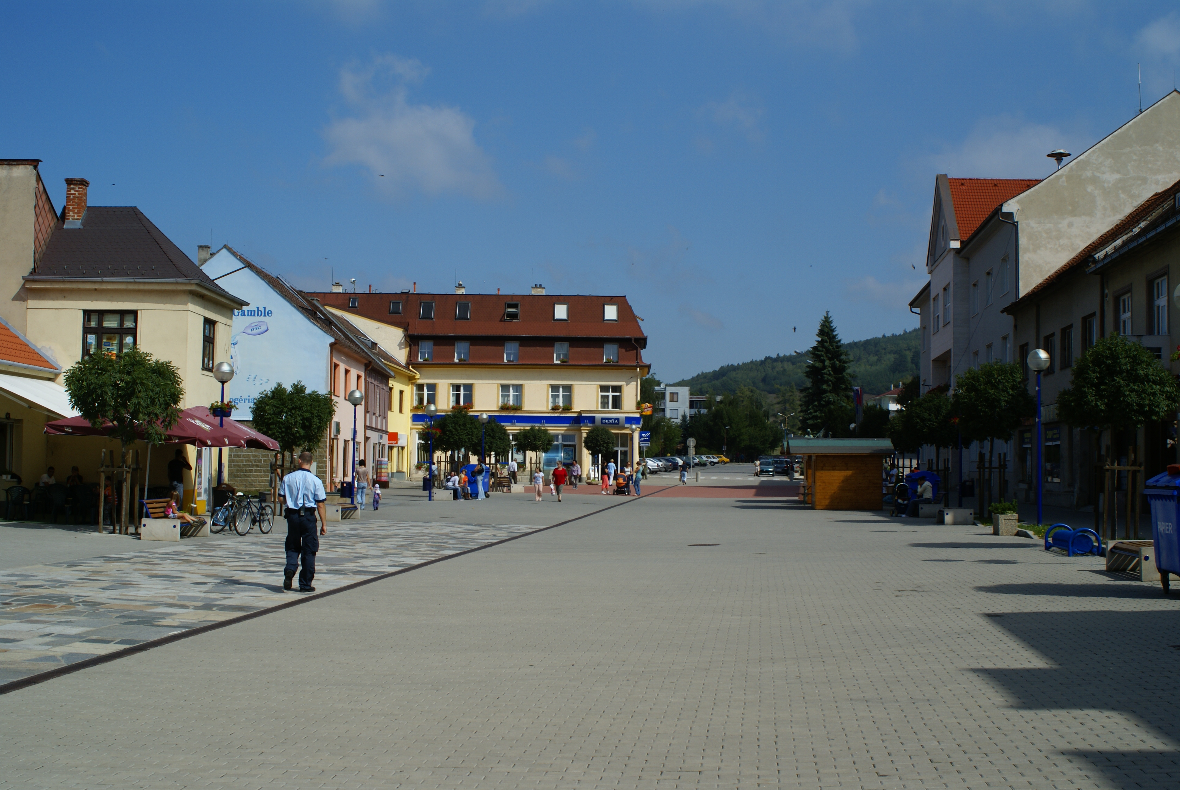 Brezová pod Bradlom, Slovak Republic